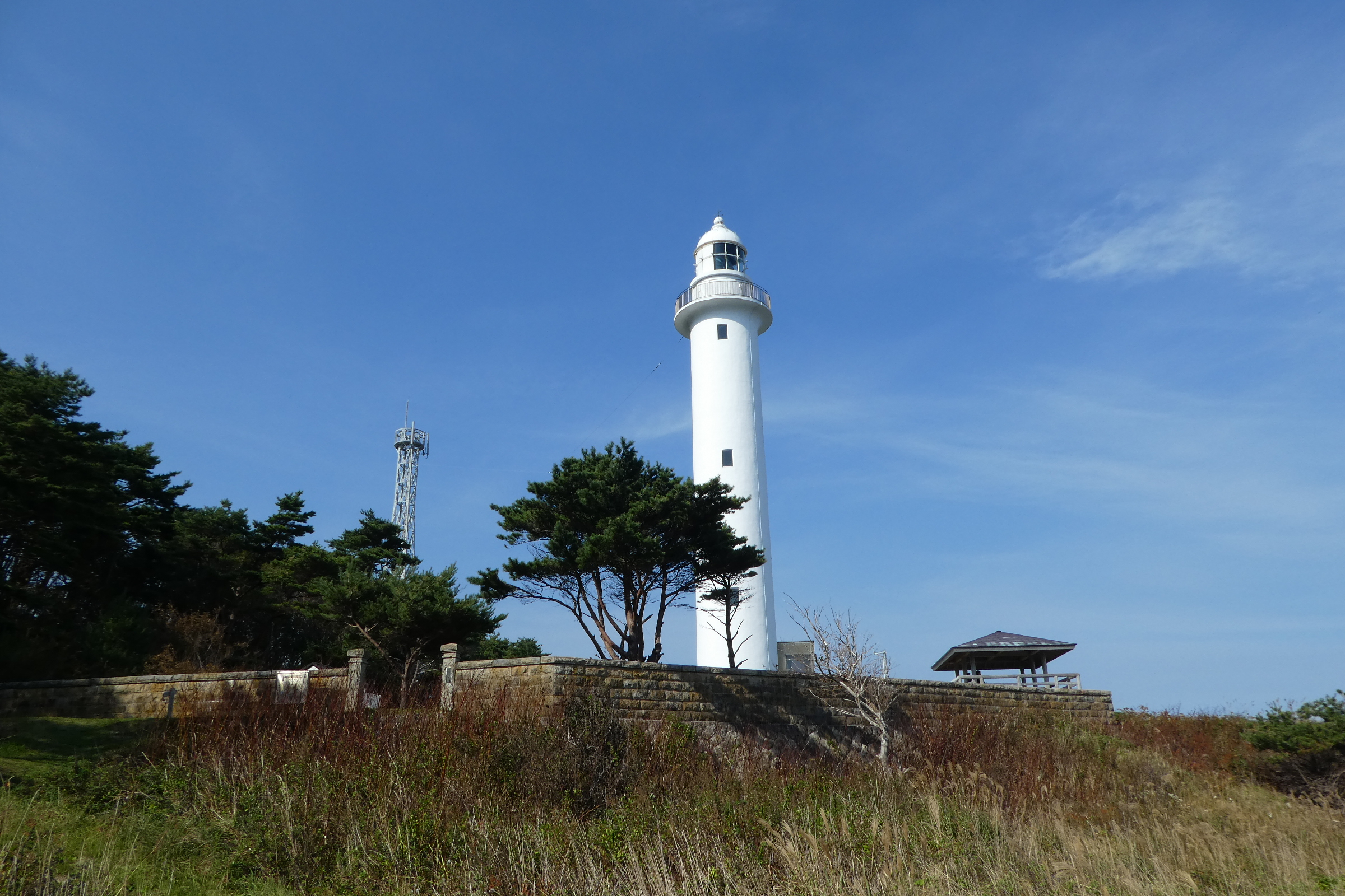 魹ヶ埼灯台（2017年10月） Todogasaki Lighthouse, Miyako, Iwate, Japan